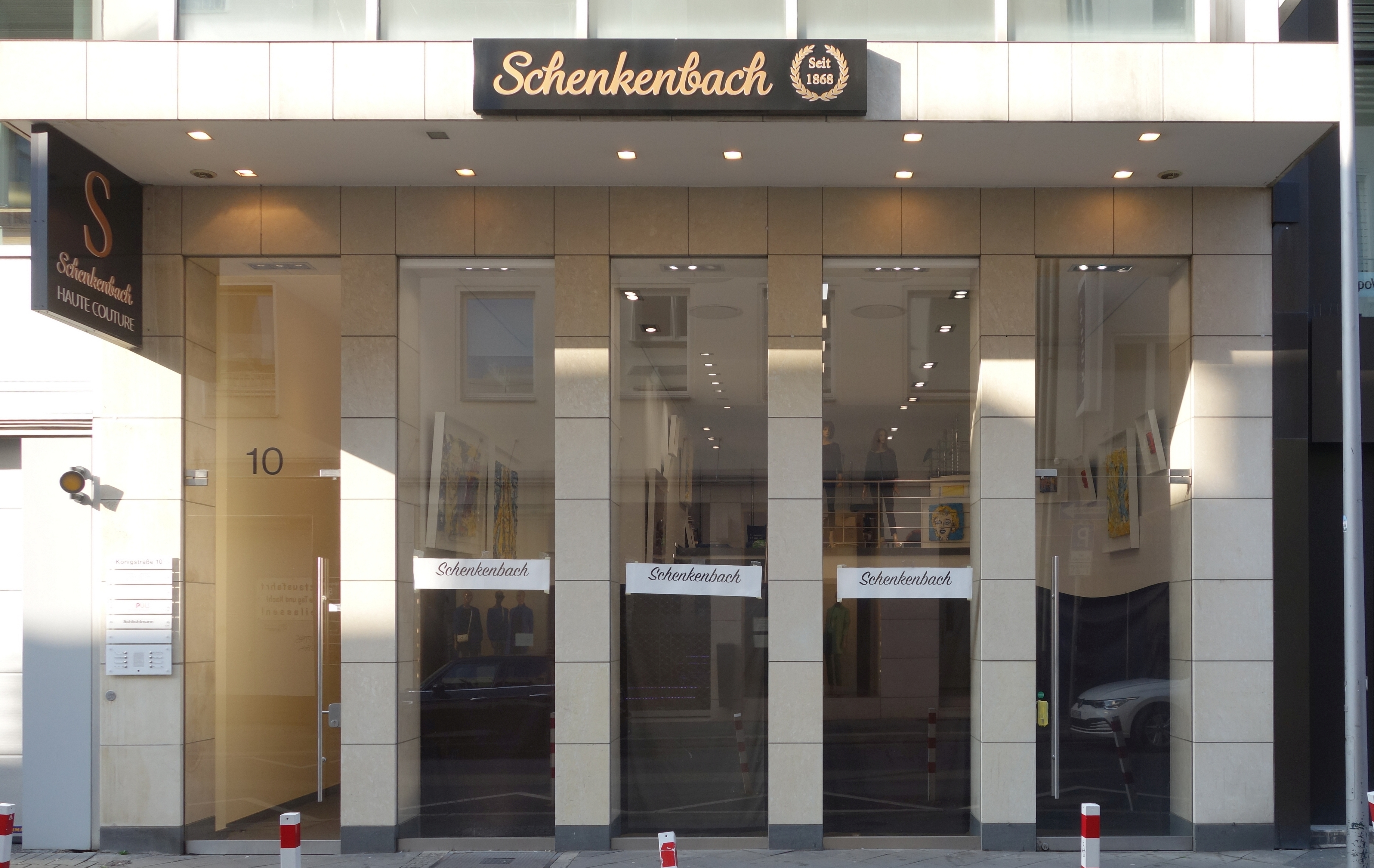 Schenkenbach Haute Couture, Düsseldorf, Königstraße, 28. März 2020. Mit frisch montierter Außenwerbung, nach dem Umzug, vor der offizeielle Wierdereröffnung, zur Zeit der COVID-19-Pandemie. Nach dem Umzug aus der Altstadt, vor der offiziellen Wiedereröffnung